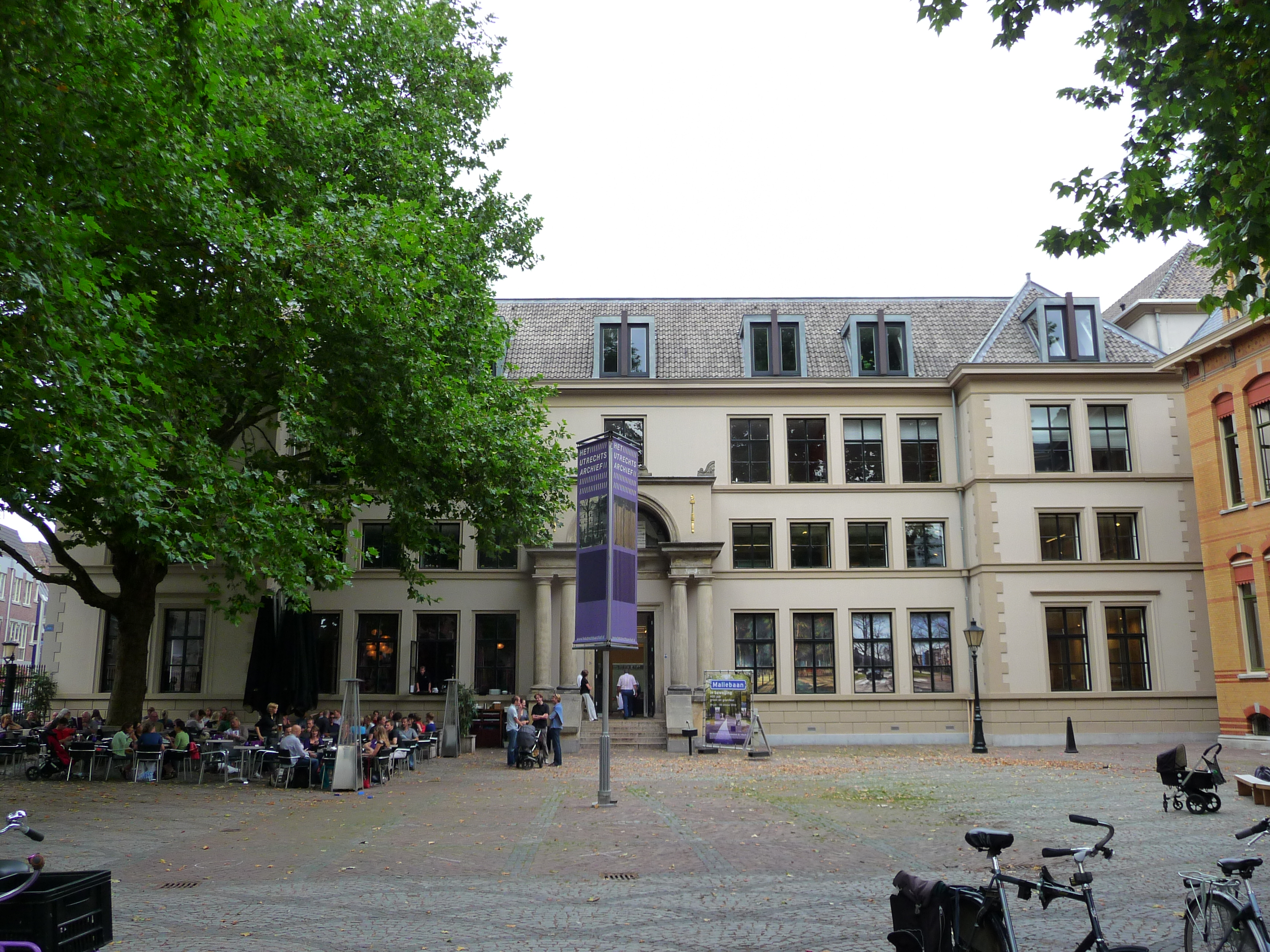 Rijksmonument in Utrecht